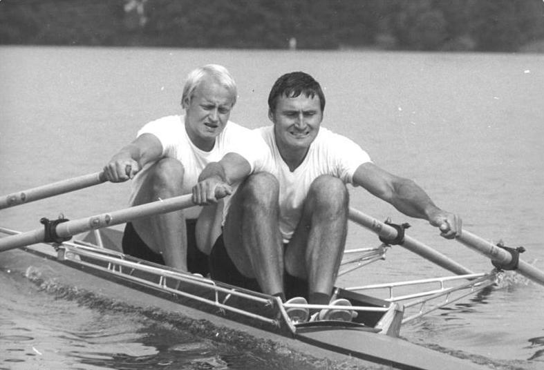 Joachim Dreifke, Klaus Kröppelien ADN-ZB Mittelstädt 24.8.82 Luzern-Schweiz:Ruderweltmeisterschaften- Die Olympiasieger und Weltmeister Joachim Dreifke (vorn) und Klaus Kröppelien (beide ASK Rostock) gewannen ihren Vorlauf und zogen ins Halbfinale im Doppelzweier ein. (Foto vom Training in Berlin-Grünau)